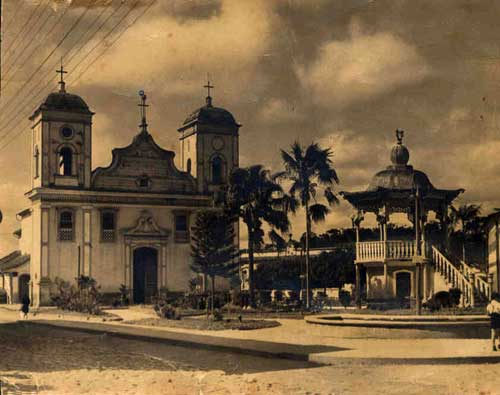 Igreja de Piranga